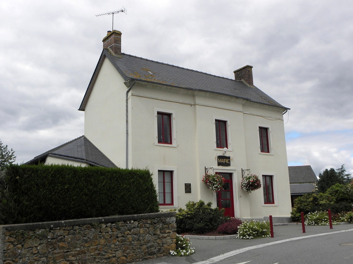 Mairie de Bréal-sous-Vitré (35).